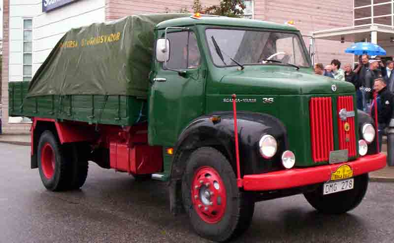 Scania-Vabis L36 Truck 1967